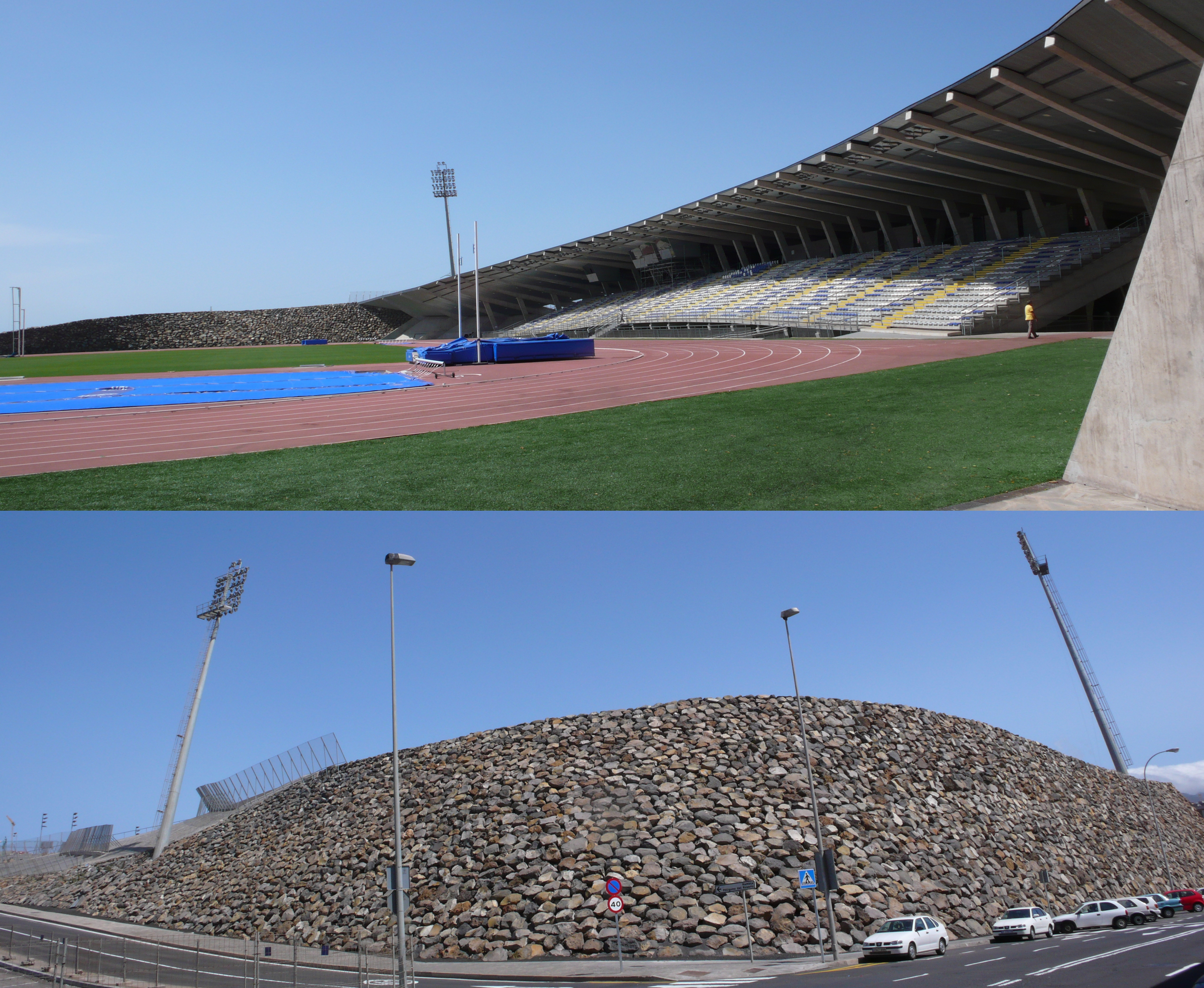 Vistas interior y exterior del Centro Insular de Atletismo de Tenerife.